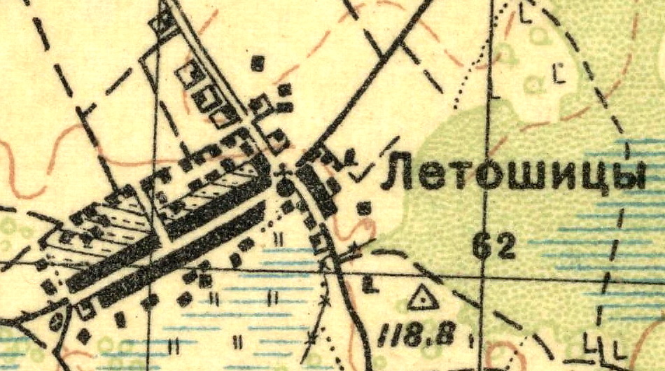 Топографическая карта Ленинградской области, квадрат О-35-23-Г (Волосово), деревня Летошицы